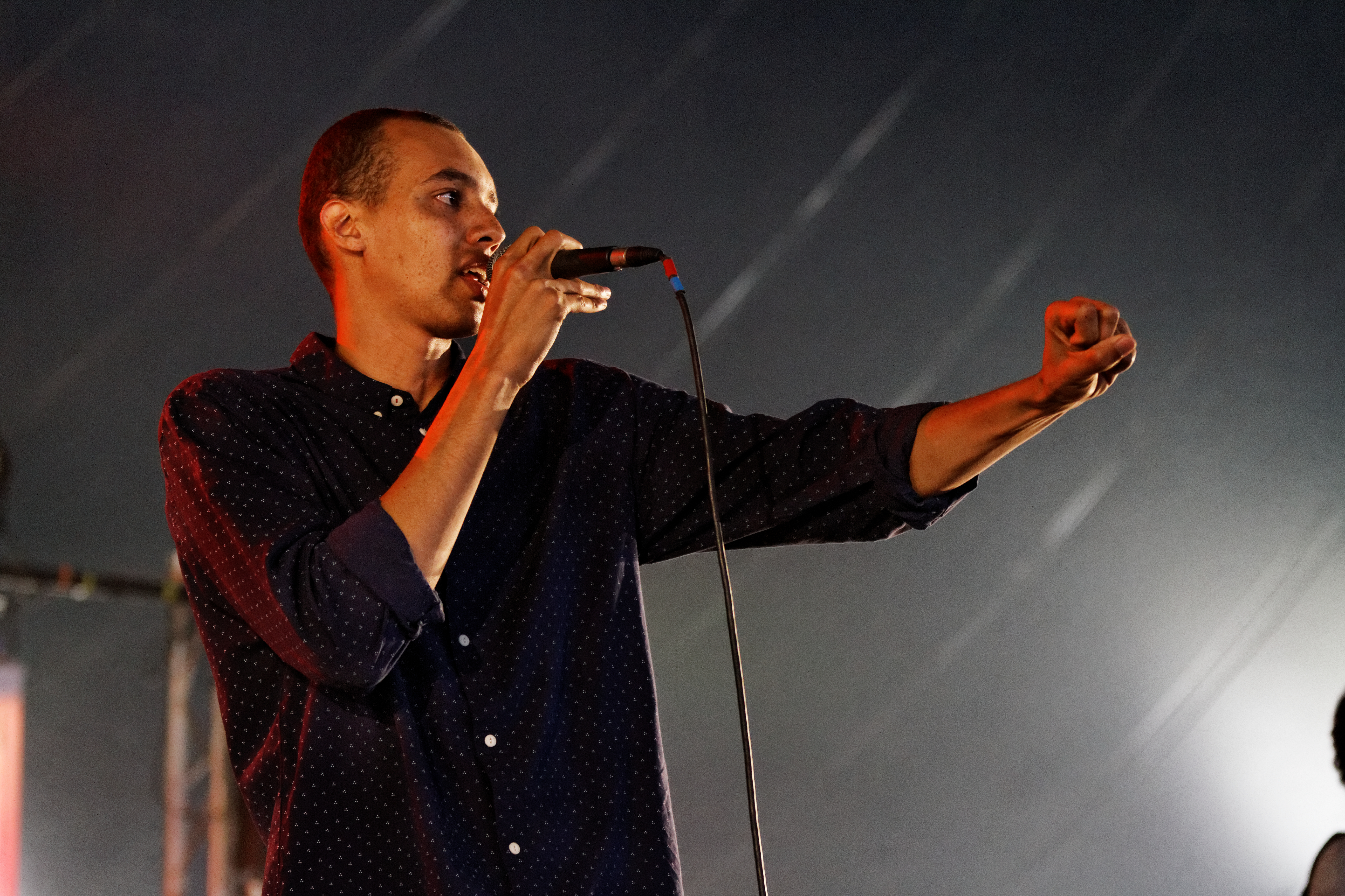 Gaël Faye en concert sur la scène Cabaret lors du festival du bout du Monde à Crozon dans le Finistère (France).